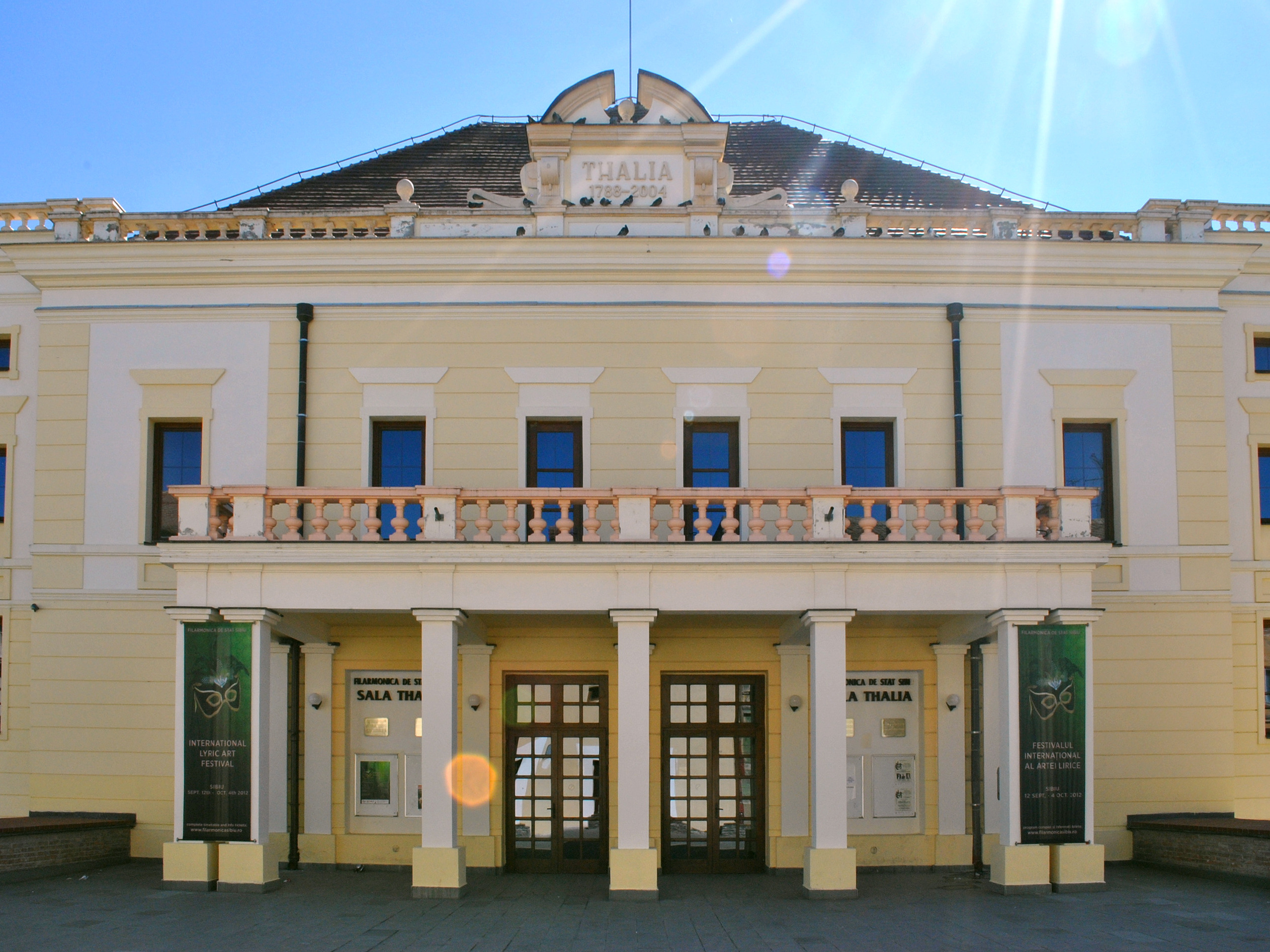 Sala Thalia (teatru orășenesc între 1788- 1945), construită pe Turnul Gros, 1540